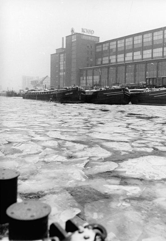 Berlin, Kabelwerk Oberspree, Lastkähne, Winter ADN-ZB Schindler 8.1.85 Berlin: Wetter- Blick vom Eisbrecher "Seelöwe" auf das Kabelwerk Oberspree. Die Kerneisstärke auf der Müggelspree beträgt im Durchschnitt 15 cm, bei zusammengefrorenen Schollen bis zu 23 cm. Der Eisbrecher sorgt für einen ungehinderten Transport für die Industriebetriebe und Heizkraftwerke der Hauptstadt.